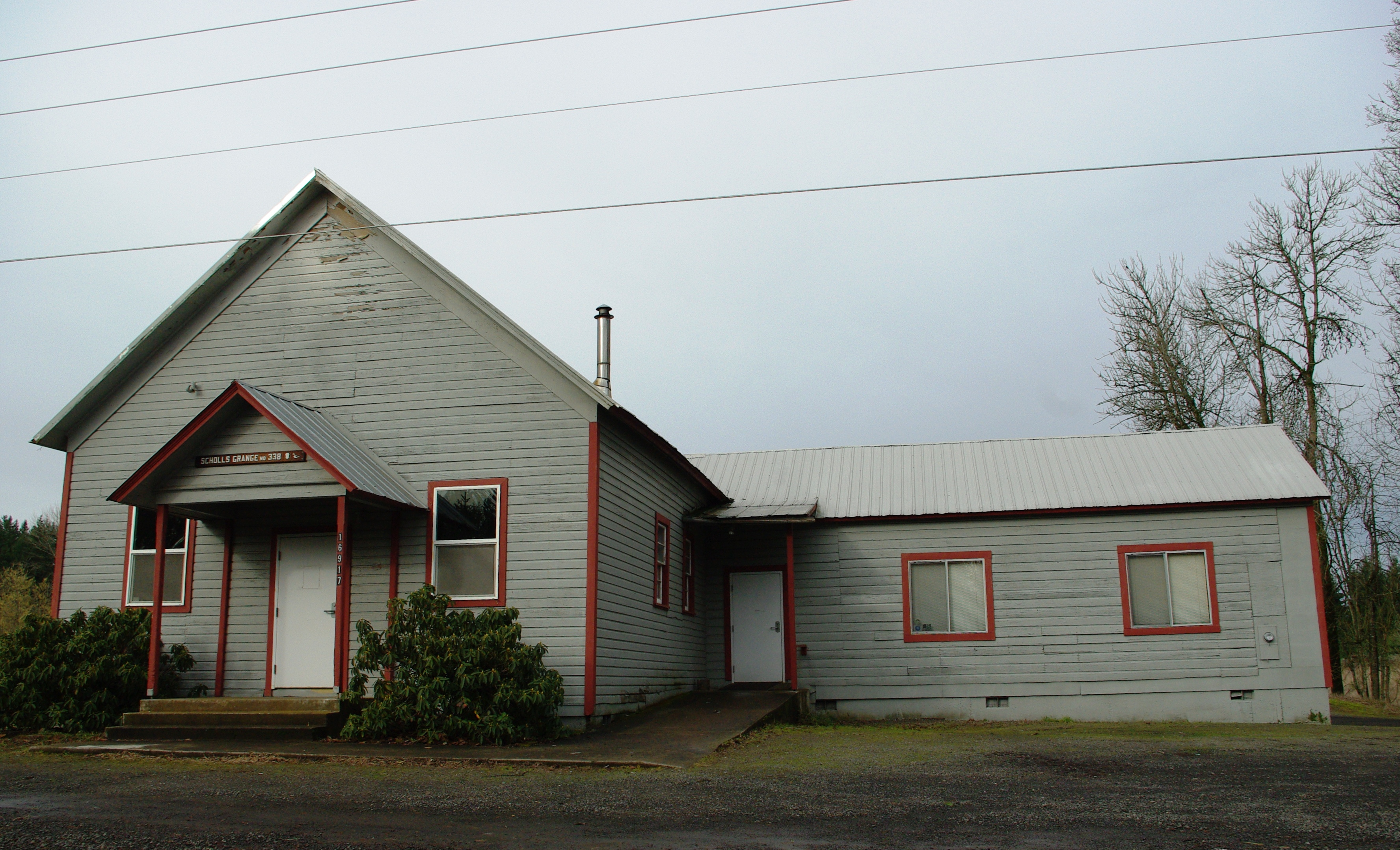 Scholls Grange in Scholls, Oregon.